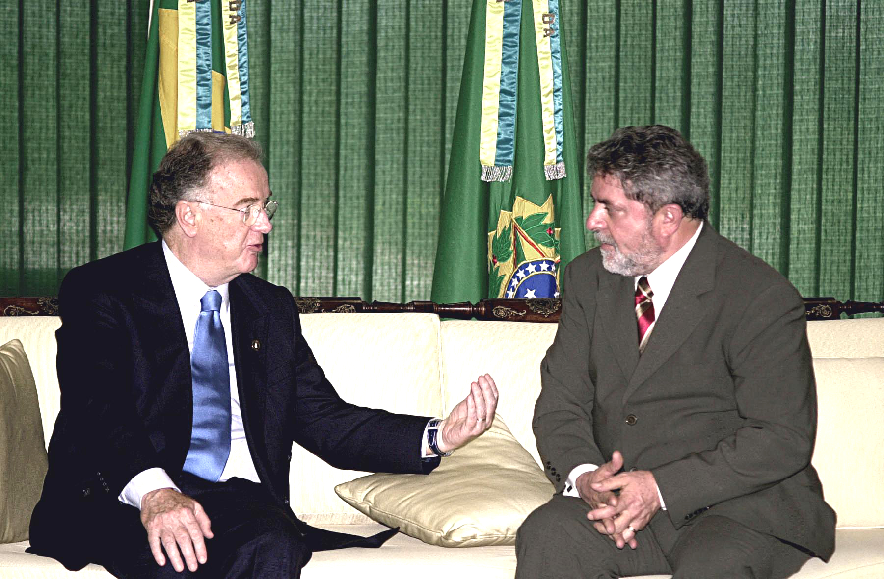 O presidente de Portugal, Jorge Sampaio, é recebido no Palácio do Planalto pelo presidente Luiz Inácio Lula da Silva.